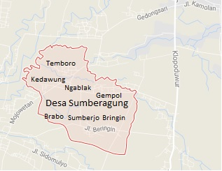 Peta Desa Sumberagung